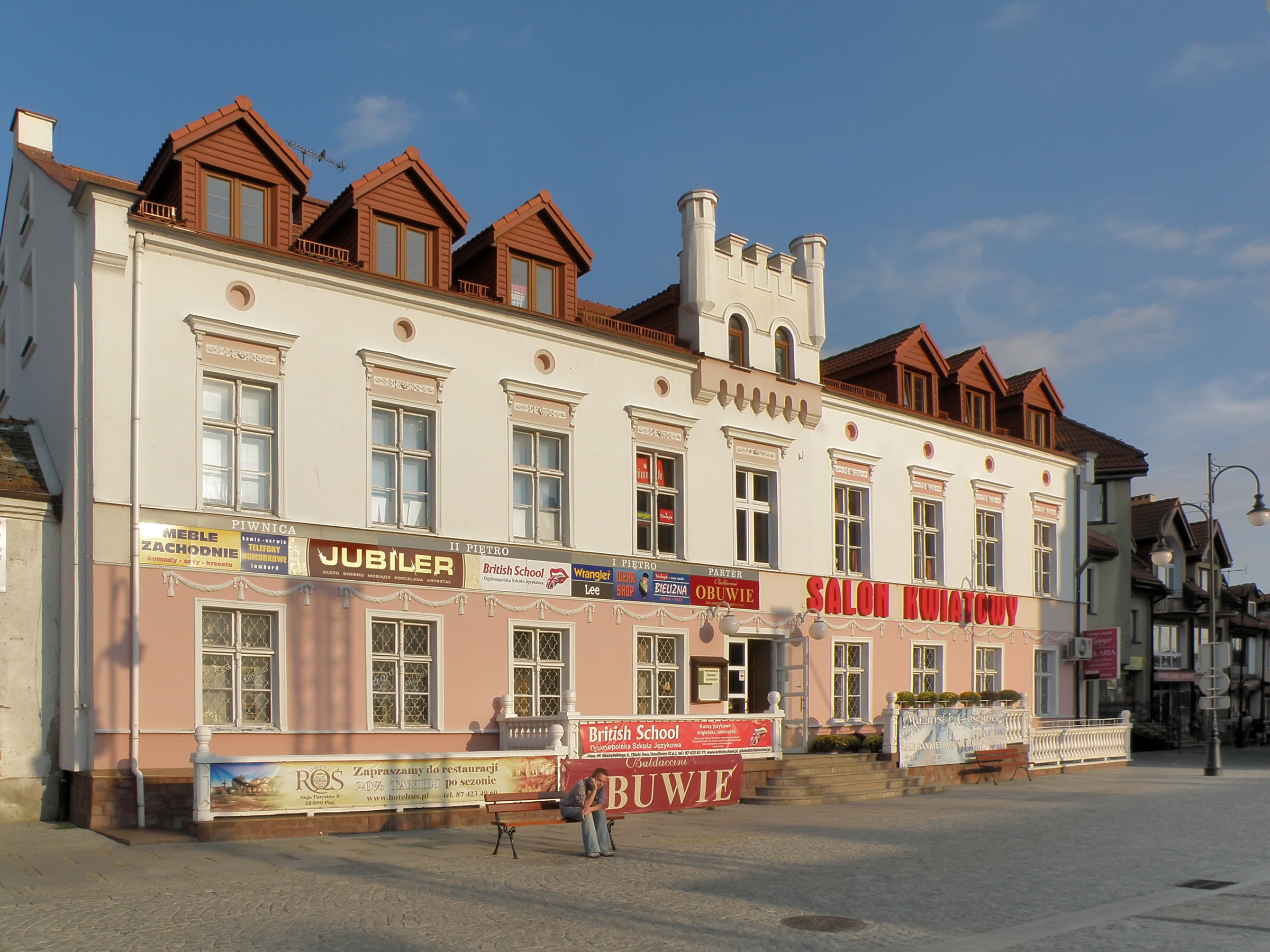 Pisz, Plac Daszyńskiego 6 - budynek mieszkalny (zabytek nr A-3176 z dn. 18.07.1991) This photo of Warmian-Masurian Voivodeship was taken during Wikiexpedition 2012 set up by Wikimedia Polska Association.You can see all photographs in category Wikiekspedycja 2012. The making of this document was supported by Wikimedia Polska.